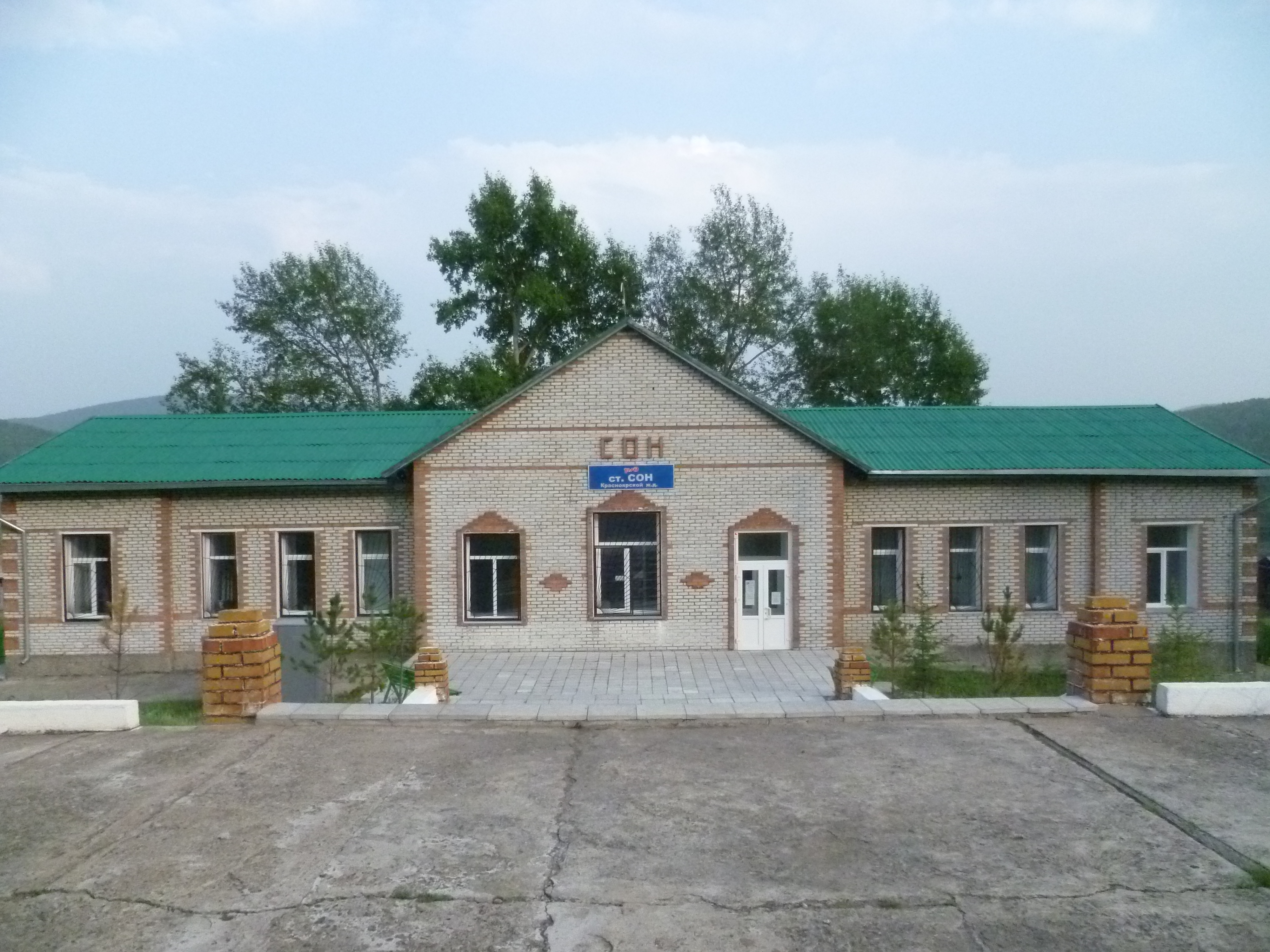 Вокзал ст. Сон, Хакасия